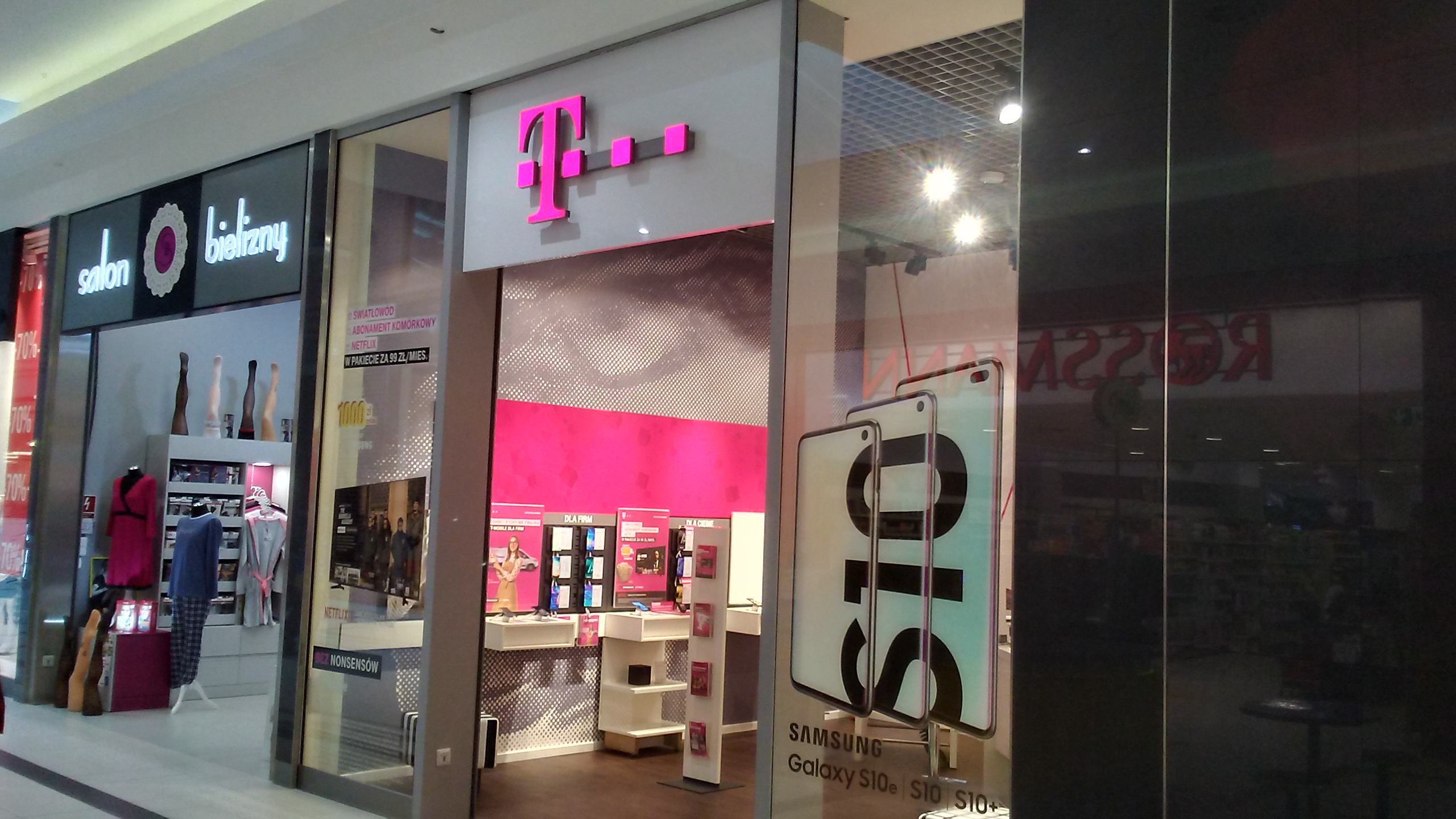 Tomaszów Mazowiecki w województwie łódzkim. Jeden z salonów T-Mobile w Tomaszowie. PL.EU.CC0